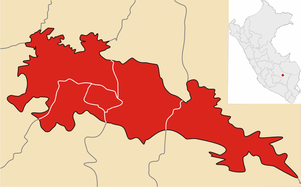 Mapa de Cuzco segmentado por distritos